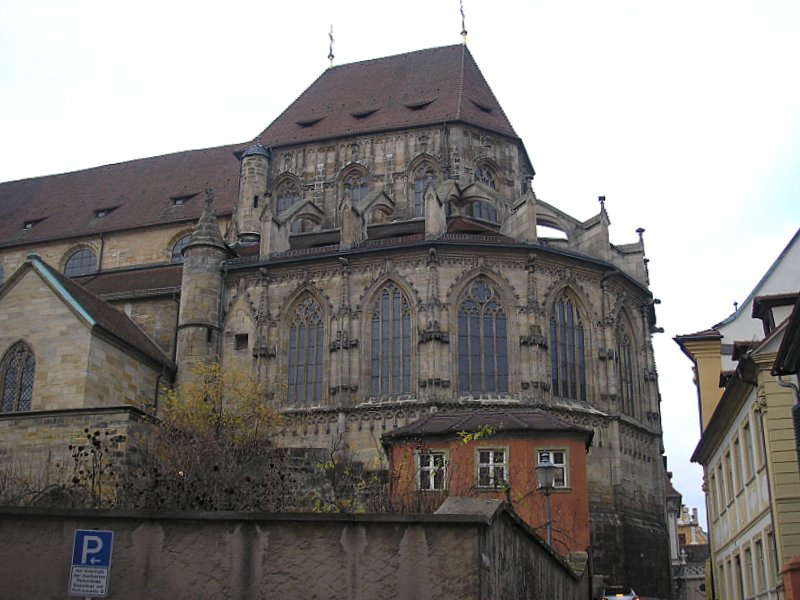 Obere Pfarrkirche Bamberg (Oberfranken). Der gotische Chor. Eigene Aufnahme, Dez. 2006 / Upper Parish Church (Bamberg, Upper Franconia, Germany). The gothic choir. Own photo, Dec. 2006